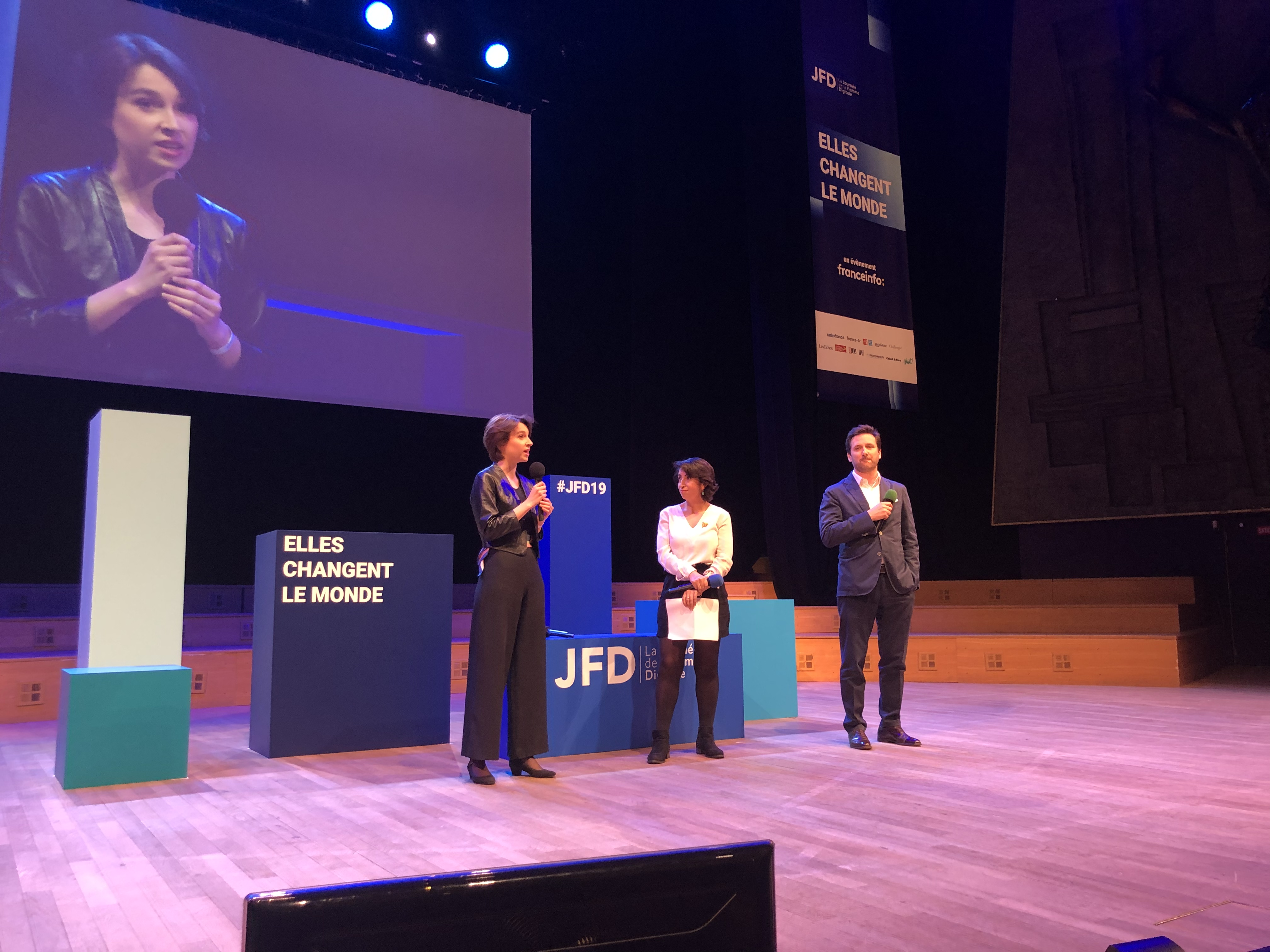 JFD19 journée de la femme digitale Paris 2019